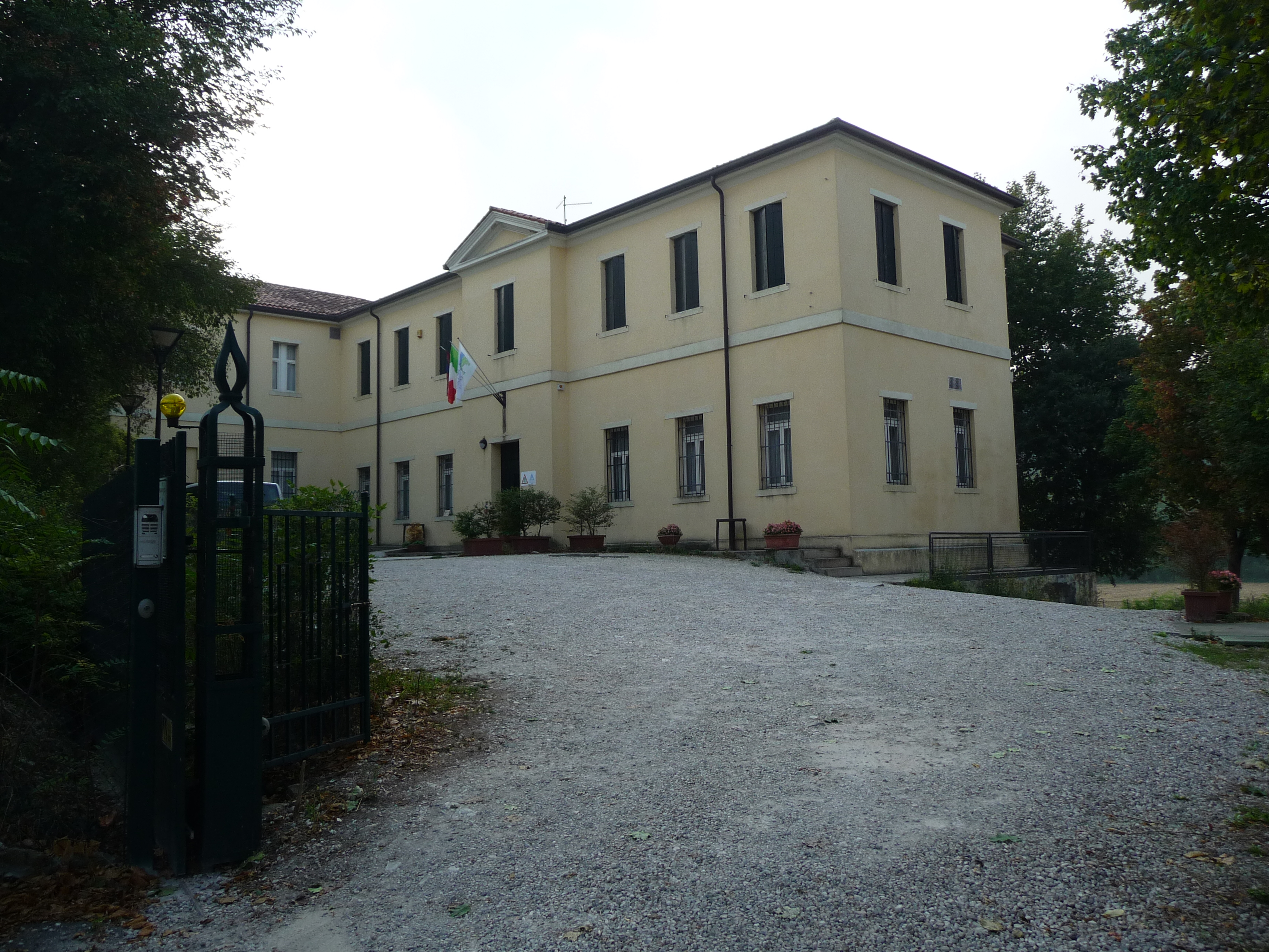 Esterno dell'Ostello ripreso dall'ingresso principale